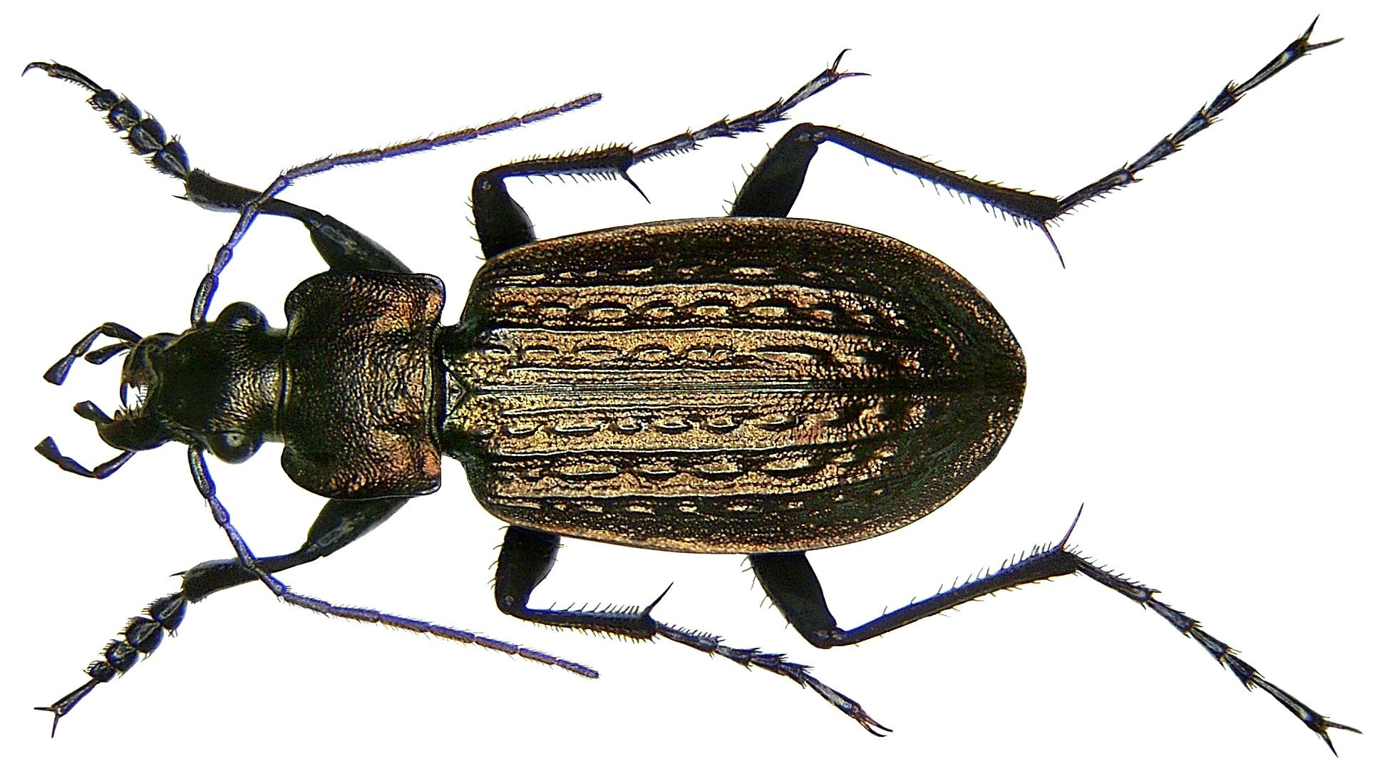 Familie: Carabidae Größe: 16-23 mm Verbreitung: Palaearktis Ökologie: in Wäldern Fundort: Germania, Oberfranken, Bad Steben leg.det. U.Schmidt, 2006 Foto: U.Schmidt, 2008